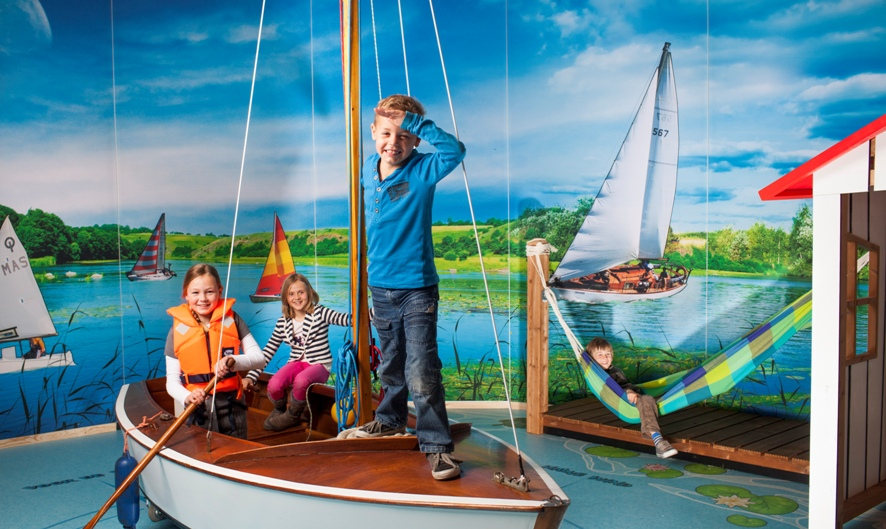 Professor Plons is de kinder-doe-tentoonstelling van het Maritiem Museum Rotterdam.